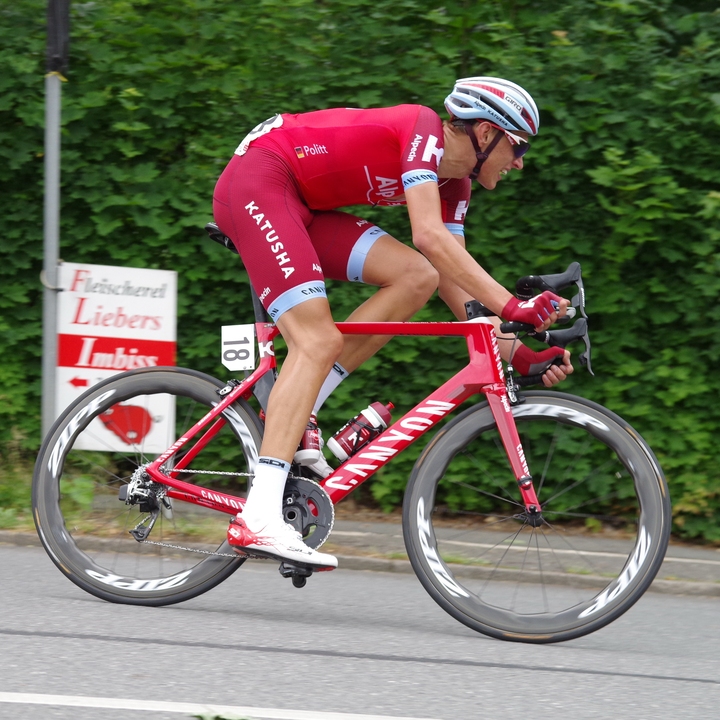 Deutsche Meisterschaften im Straßenrennen 2017 (Männer) 25. Juni 2017 Runde 10 Augustusburger Straße The making of this document was supported by the Community-Budget of Wikimedia Germany.